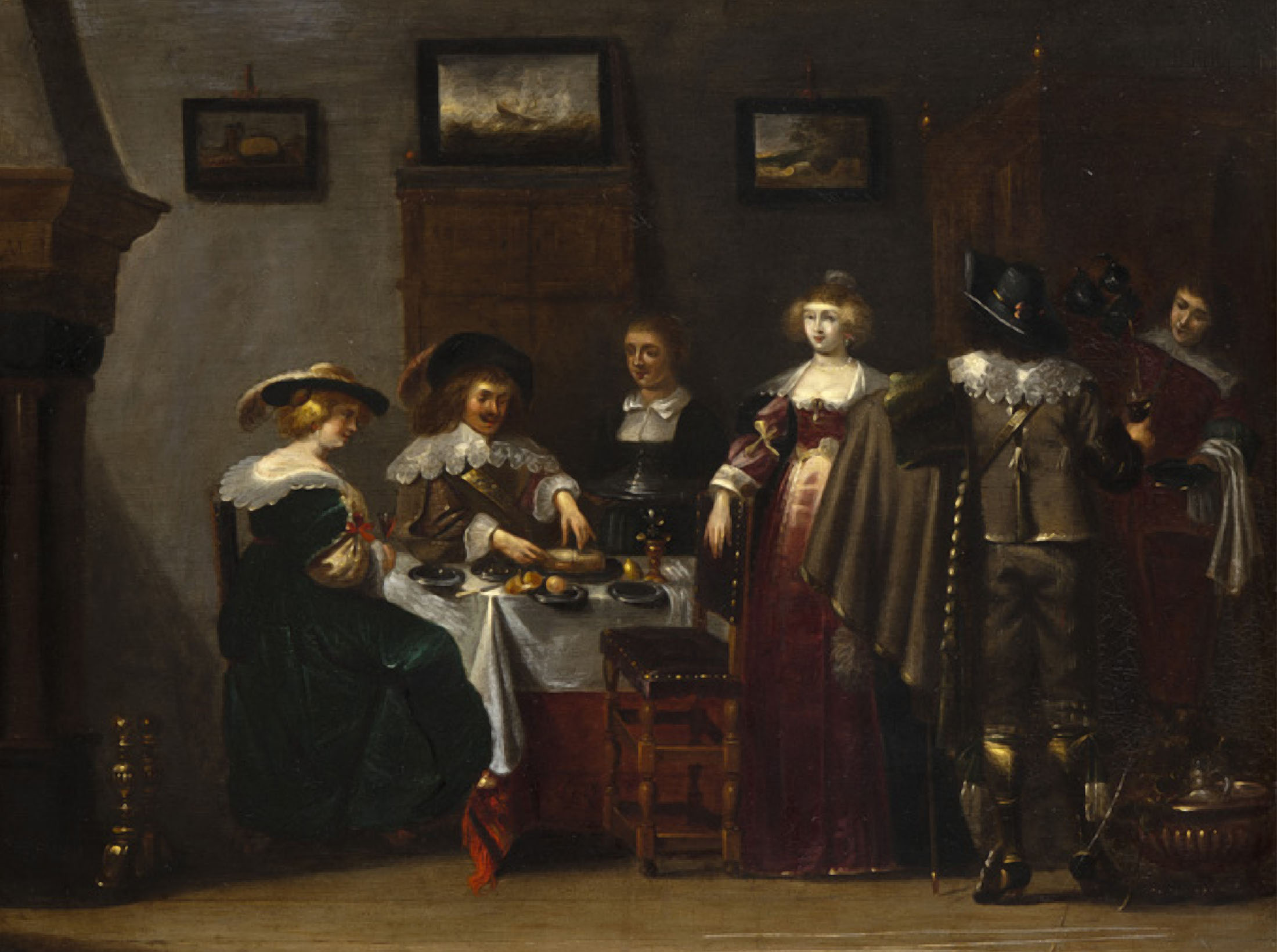 Elegante compagnie, peinture sur cuivre, Chritoffel Jacobsz. van der Lamen